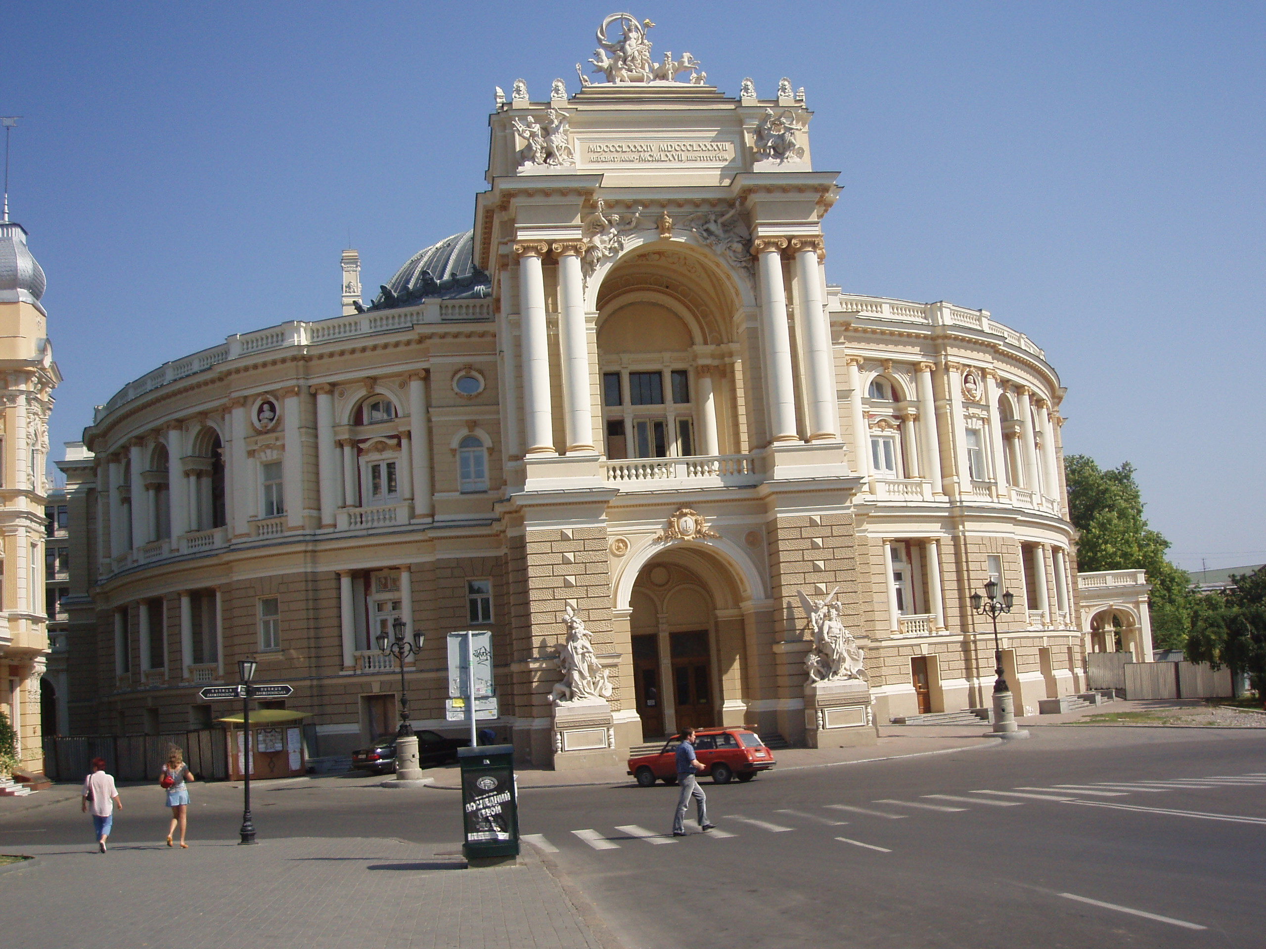 Odesa Opera House